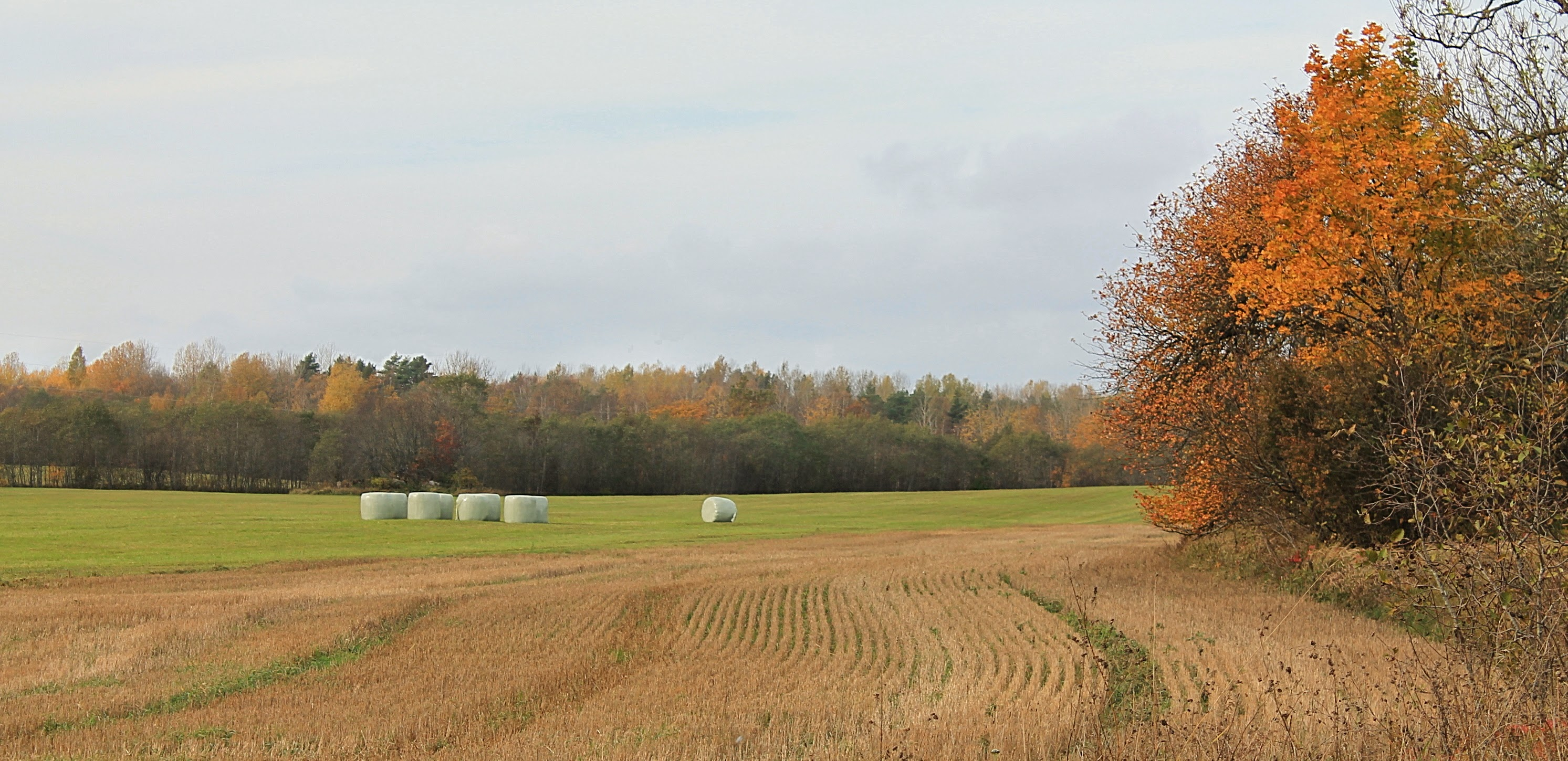 Sügisene maastik Läänemaal, Lääne-Nigula vald, Tammeoru piirkonnas